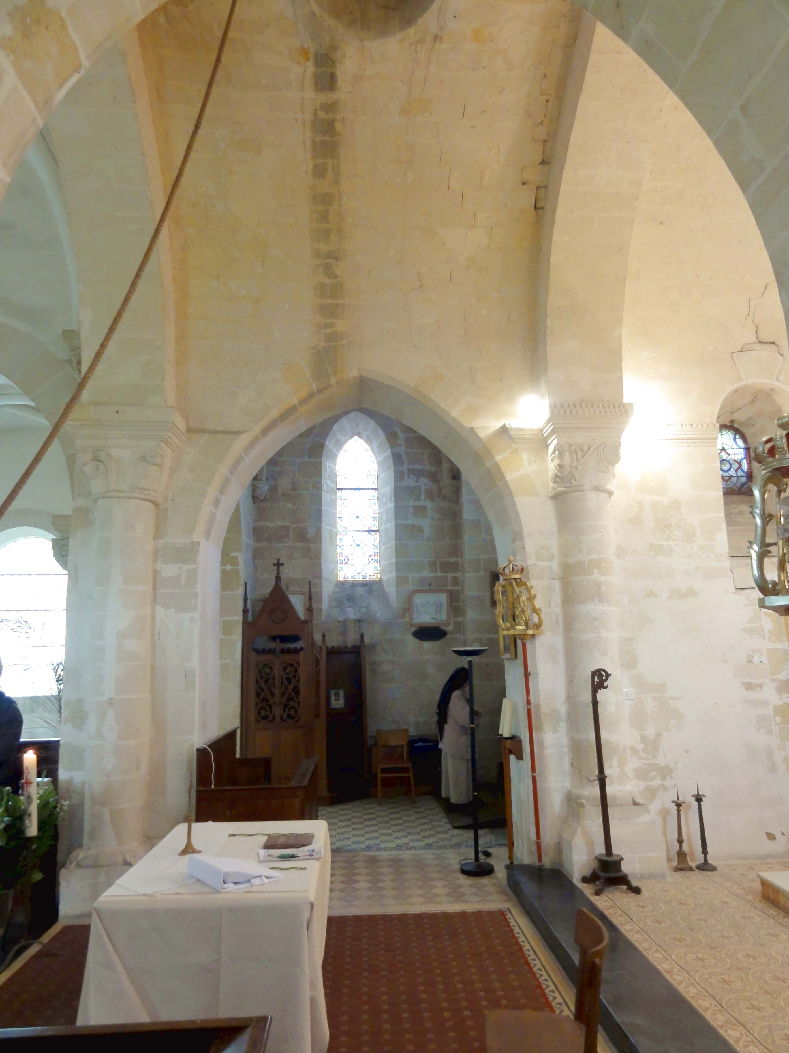 Intérieur de l'église - voir titre.